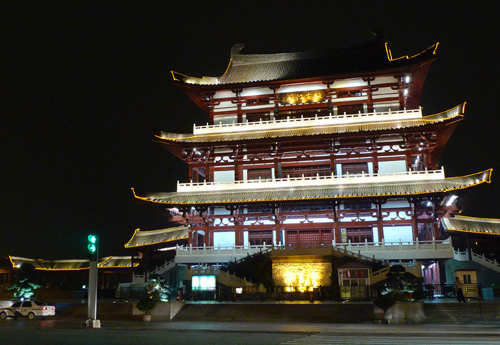 长沙杜甫江阁